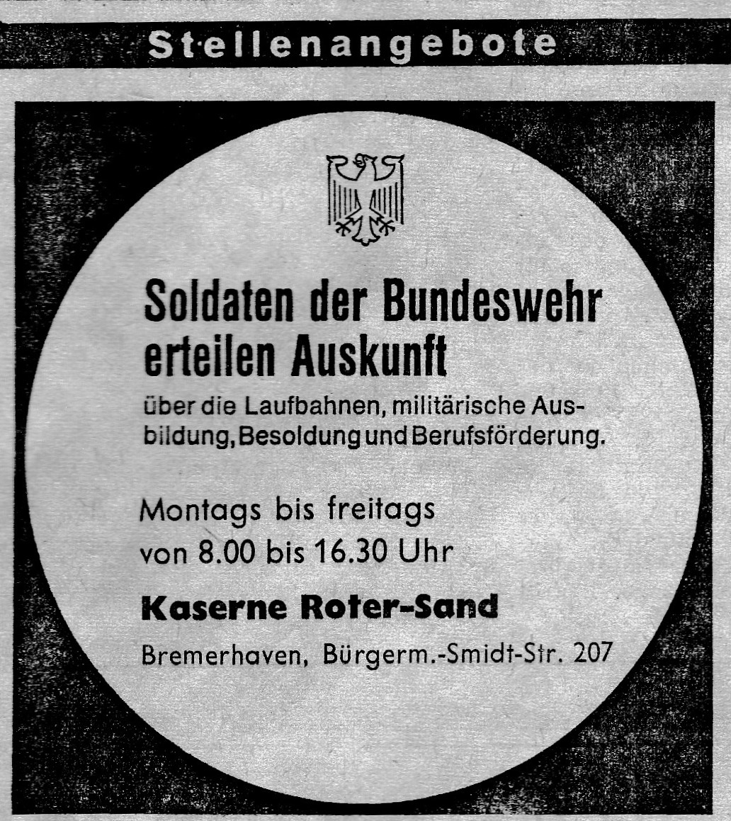 Anzeige der Bundeswehr zur Laufbahnberatung in der Nordsee-Zeitung